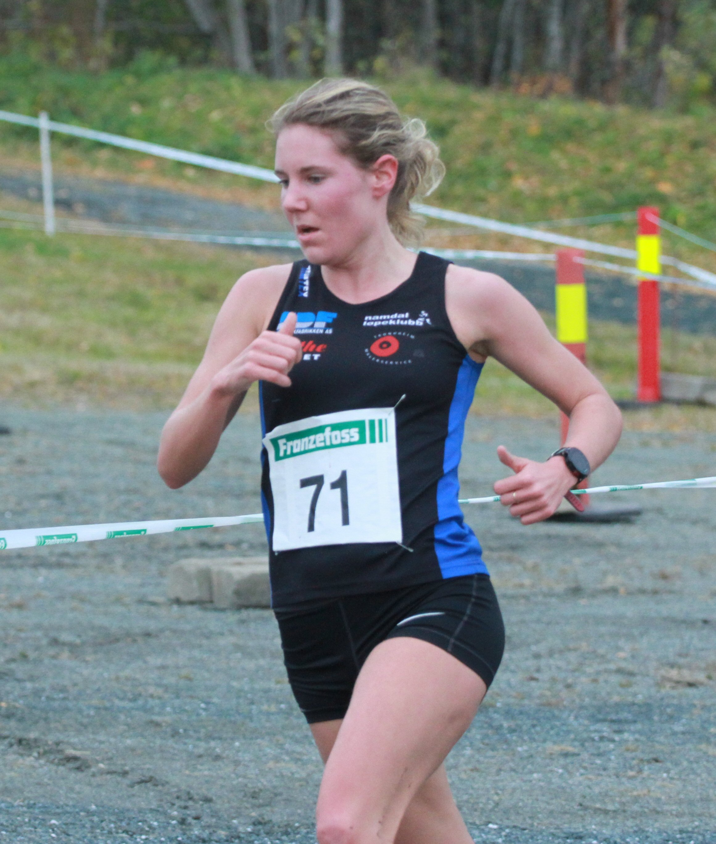 Maria Sagnes Wågan under NM i terrengløp i 2018.